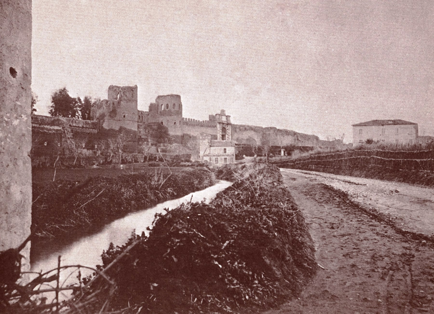 Fosso delle tre Madonne (scomparso. Attualmente su quel terreno sotto le mura aureliane c'è via Sannio.